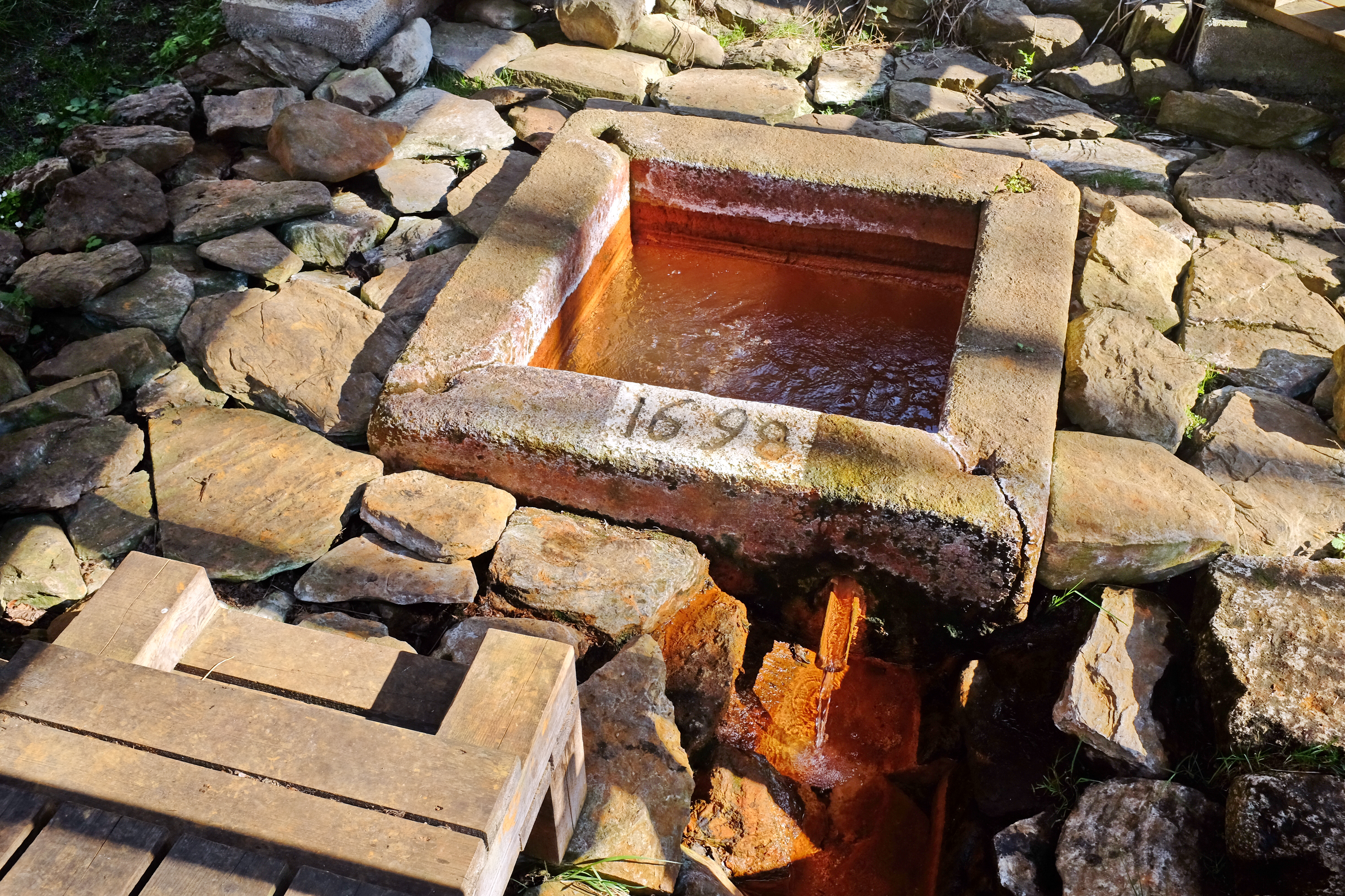 Minerální pramen "Kyselecký hamr", v lese u osady Mýtina na naučné stezce "Stebnický potok, okres Cheb